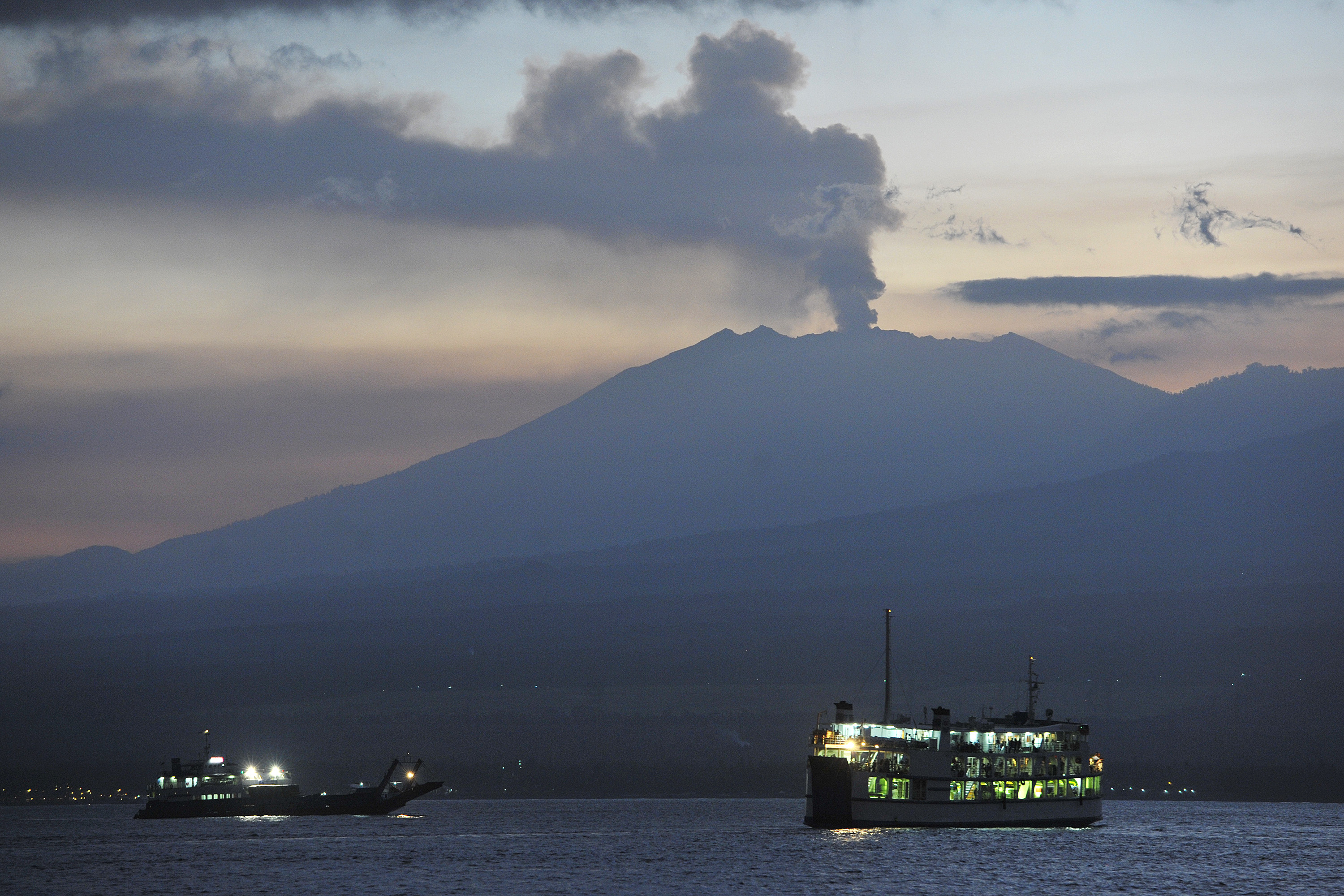 Upload ke Wikimedia Commons Dua kapal ferry yang membawa pemudik menyeberangi Selat Bali dengan latar belakang erupsi Gunung Raung pada H-5 Lebaran di Pelabuhan Gilimanuk, Jembrana, Bali, Minggu (12/7). Arus mudik dari Bali ke Jawa dan Sumatera lewat jalur darat melalui pelabuhan tersebut diprediksi mengalami peningkatan menyusul penutupan Bandara Ngurah Rai berulang kali akibat erupsi Gunung Raung. ANTARA FOTO/Nyoman Budhiana/ss/foc/15.